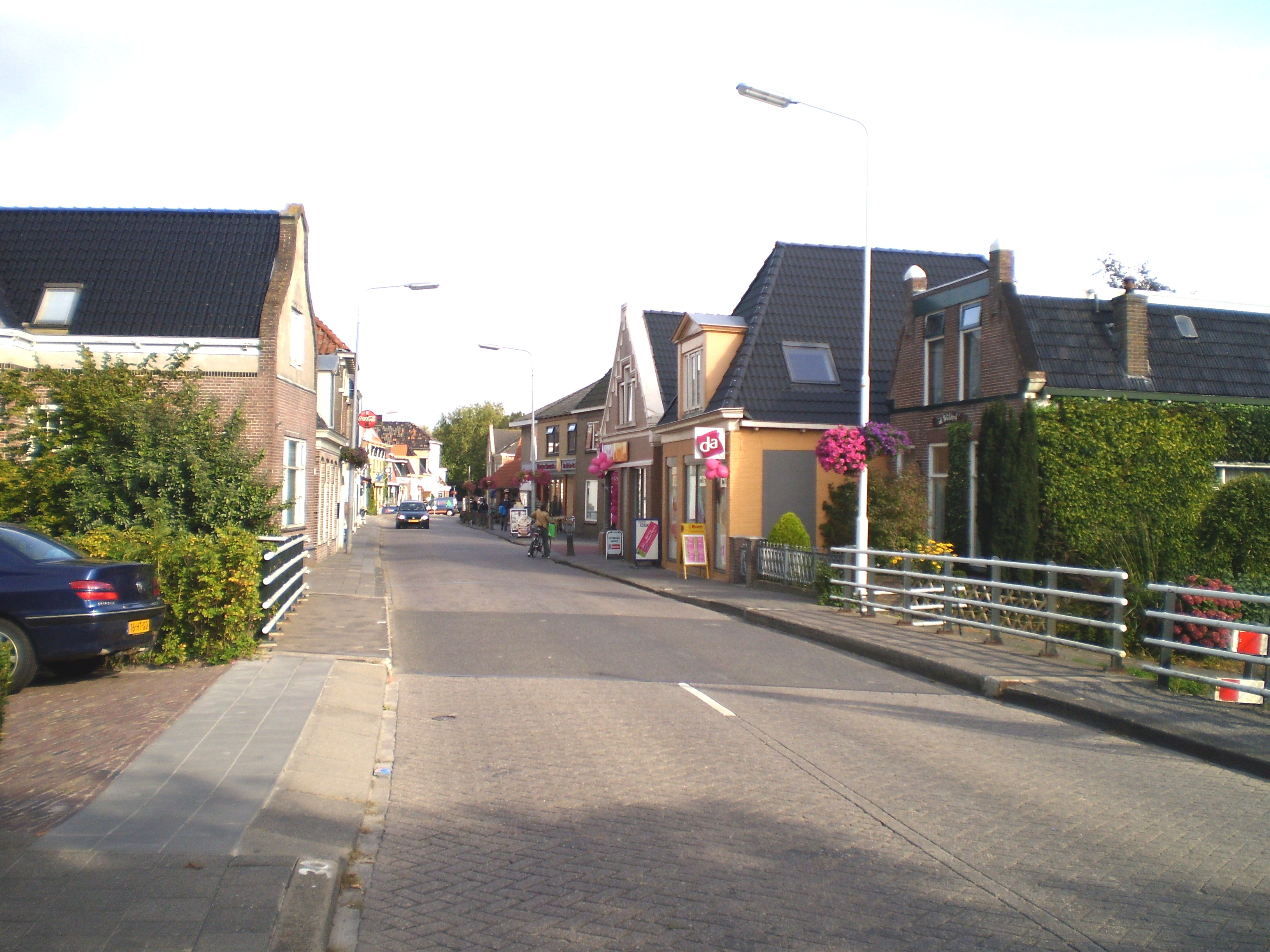 Buorren Akkrum